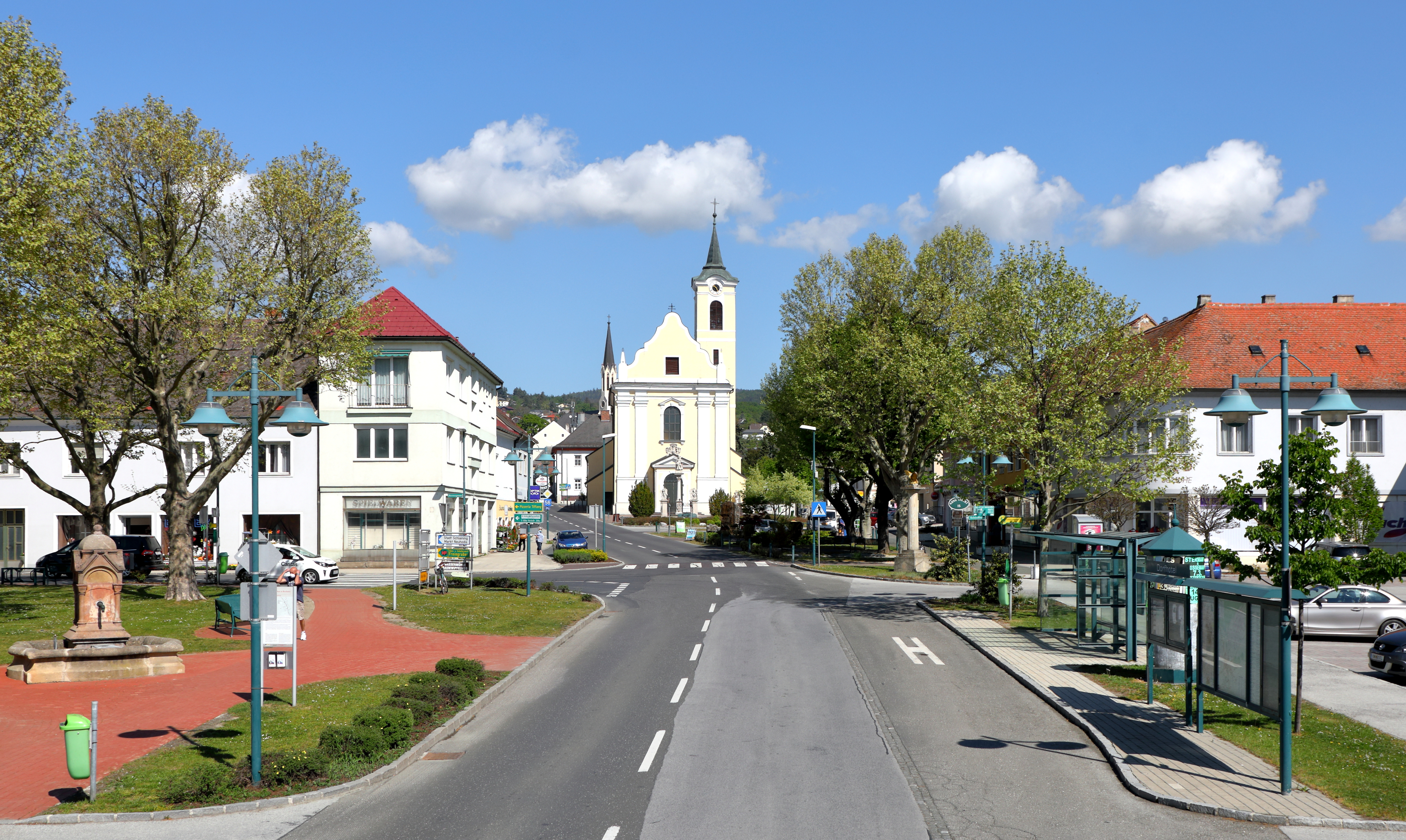 Südostansicht des Hauptplatzes der burgenländischen Marktgemeinde Rechnitz. Im Bildzentrum die röm.-kath. Pfarrkirche hl. Katharina.